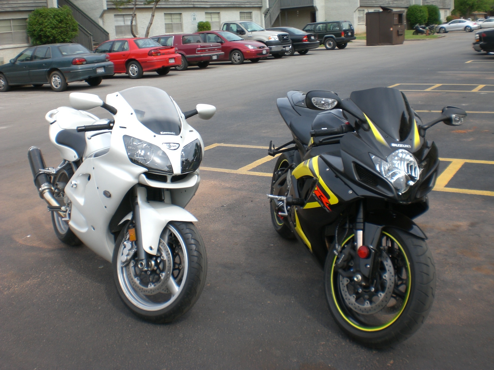 2006 gsxr 750 and 2007 zzr 600